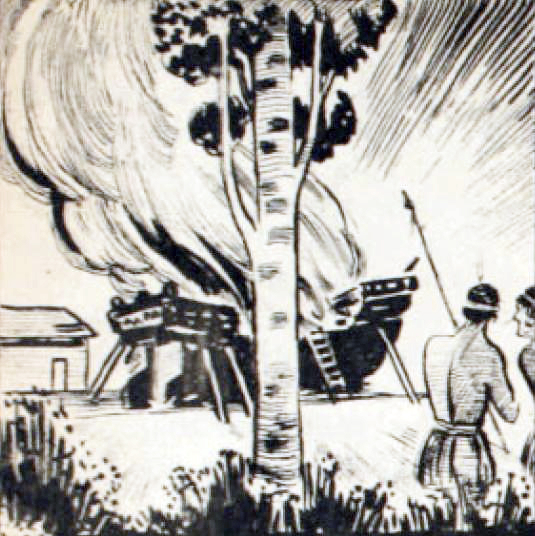 "la sublevación de los indios, encabezada por Michimalonco, empezó por exterminar a los españoles que trabajaban en los lavaderos de oro de Marga Marga y en Concón mataron a los que trabajaban en la construcción de un pequeño buque prendiendo fuego a la nave recién terminada. Don Pedro de Valdivia salió de Santiago al frente de setenta jinetes para castigar a los sublevados."